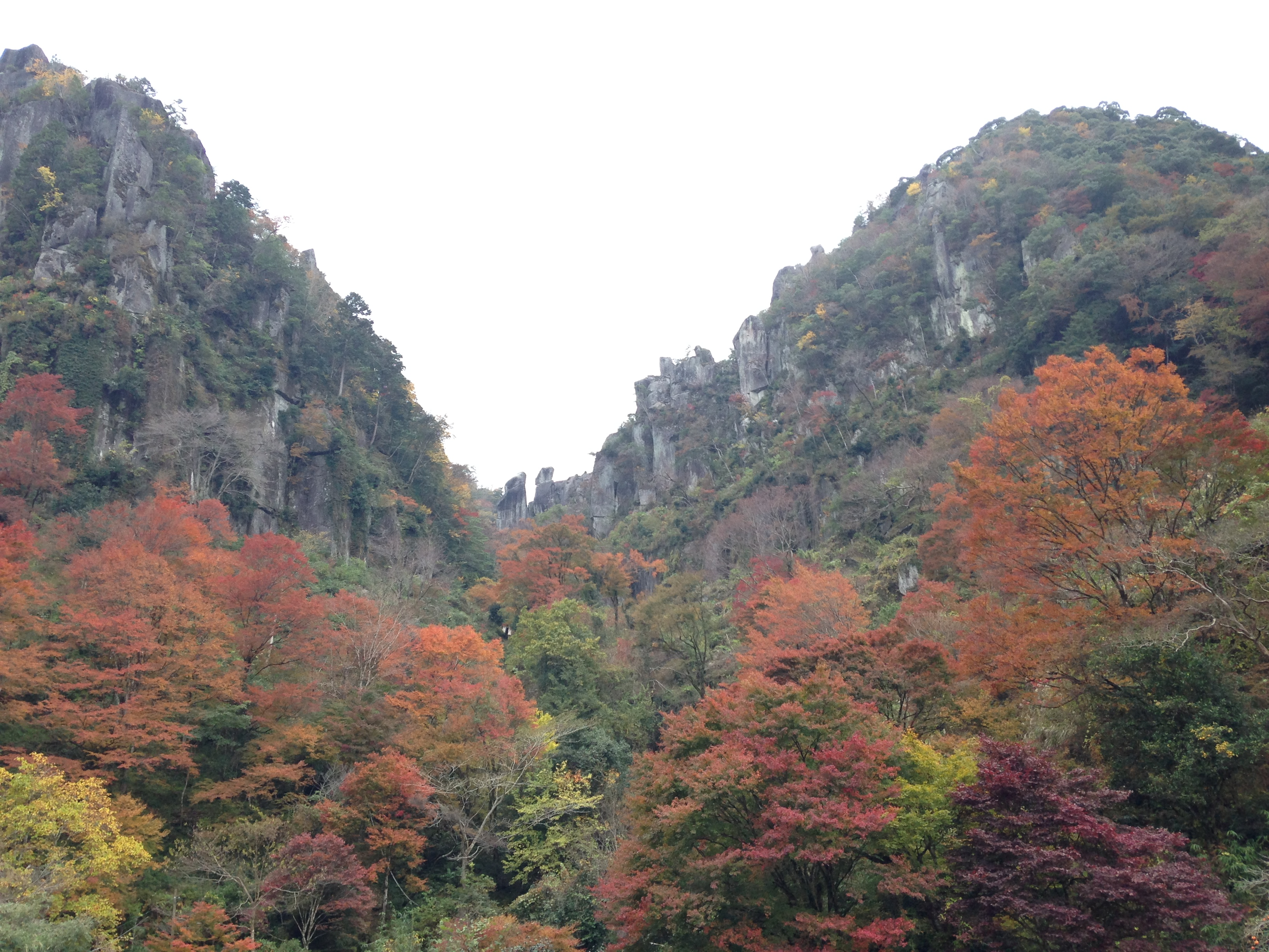 深耶馬渓の一目八景・左より鷲ノ巣山、夫婦岩と群猿山